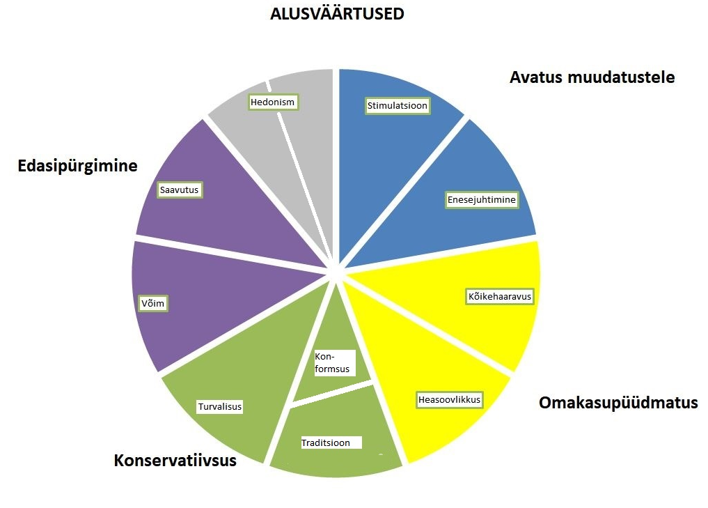 Alusväärtuste sõõrmudel